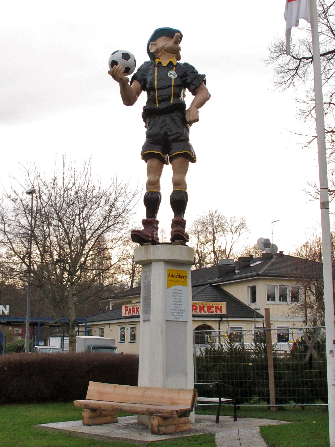 Kronblomstatyn utanför Brunnsparken och Ica Supermarket Parken i Örebro. Statyn stod ursprungligen utanför Eyravallen men flyttades och invigdes i sitt nuvarande läge i maj 2011. Kronblom hade då också bytt klubbtillhörighet från ÖSK till Adolfsbergs IK.